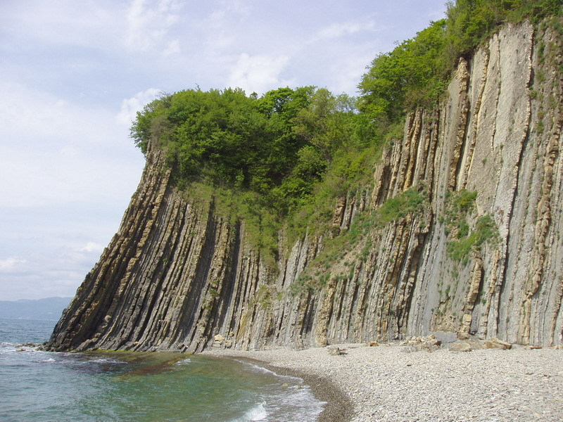 Kiselev's rock